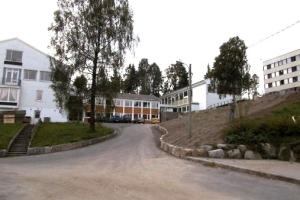 Blakstad videregående skole, avd. Blakstad